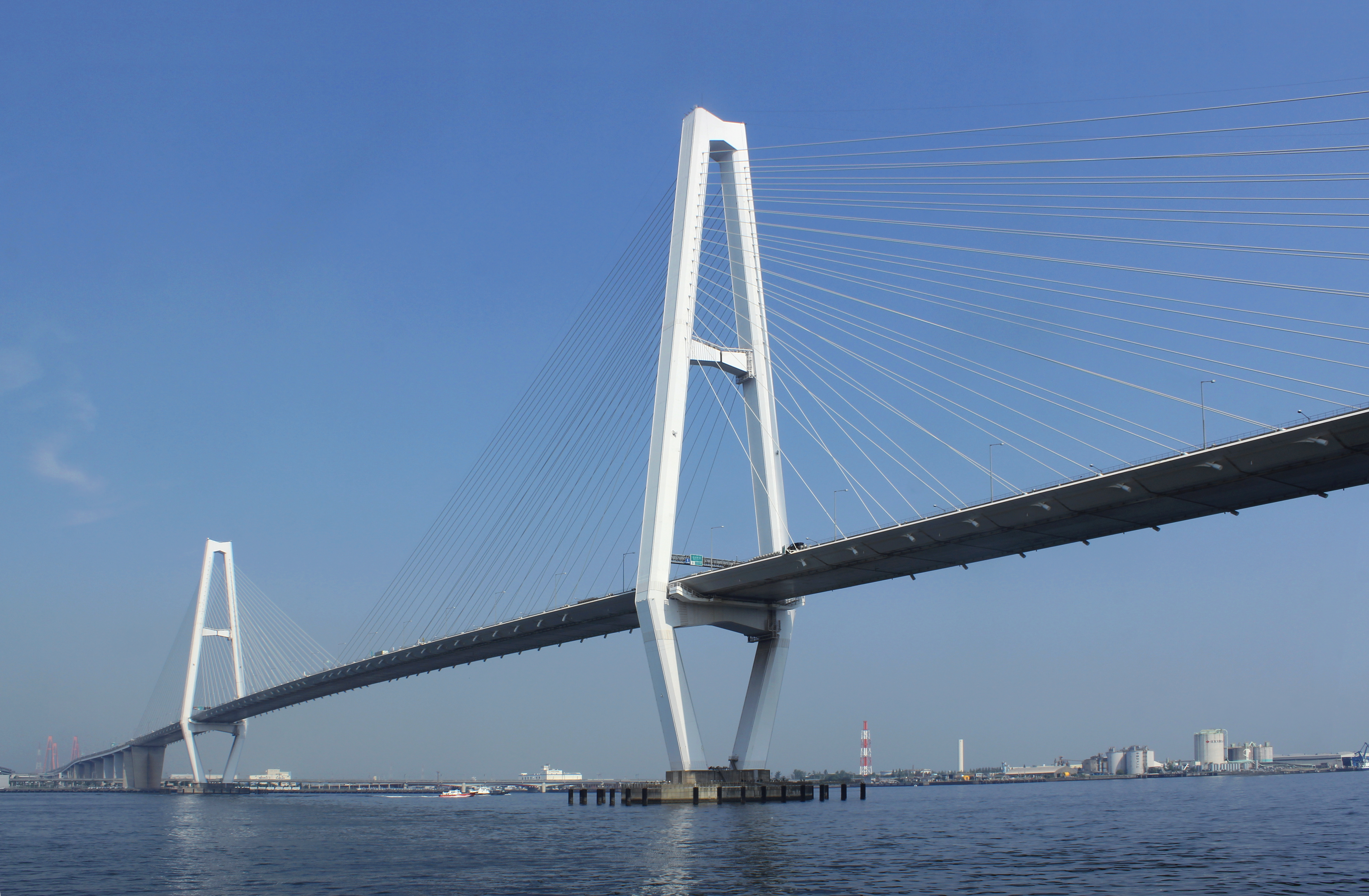 名港中央大橋。潮見ふ頭から撮影。